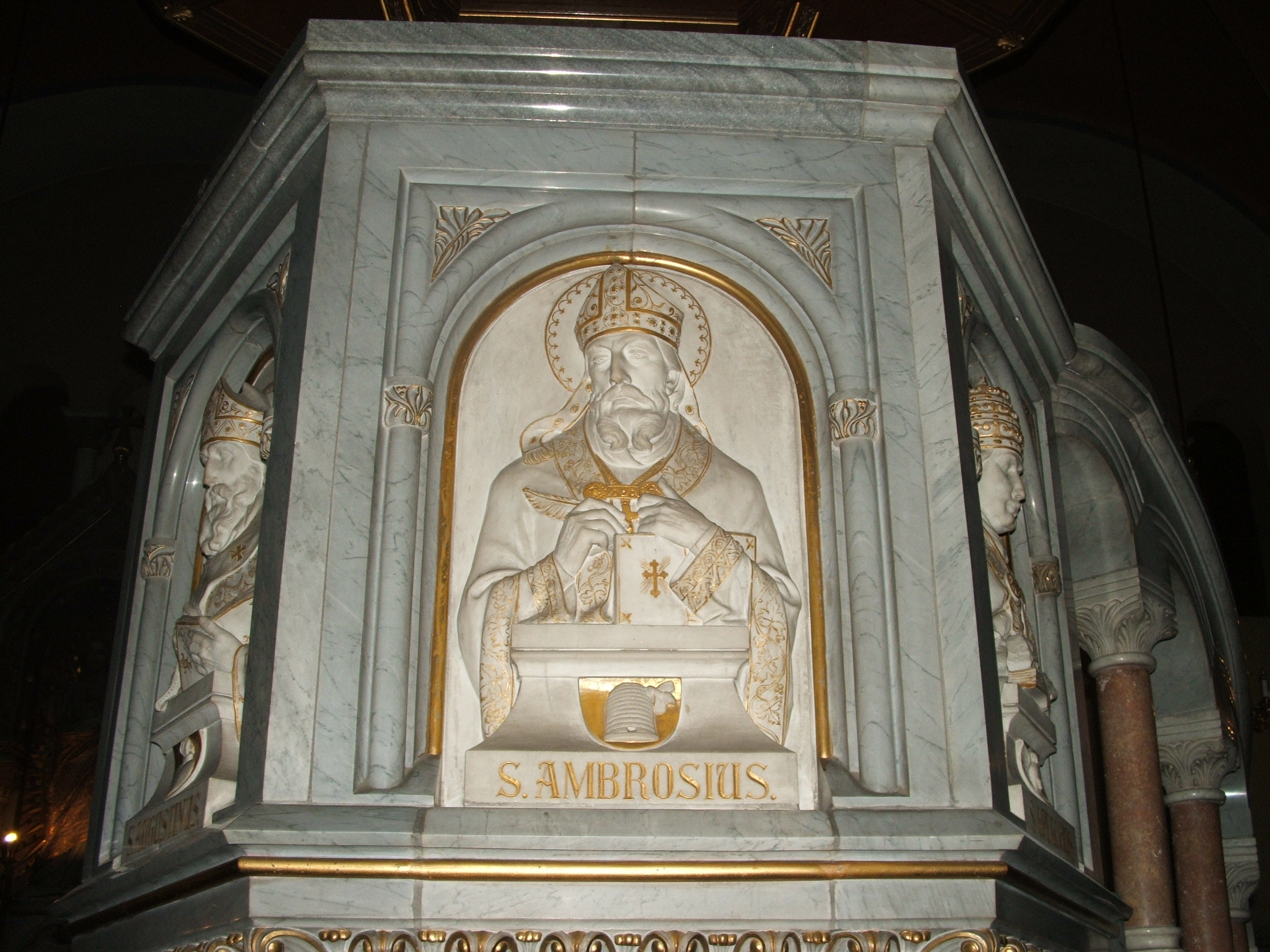 Maribor